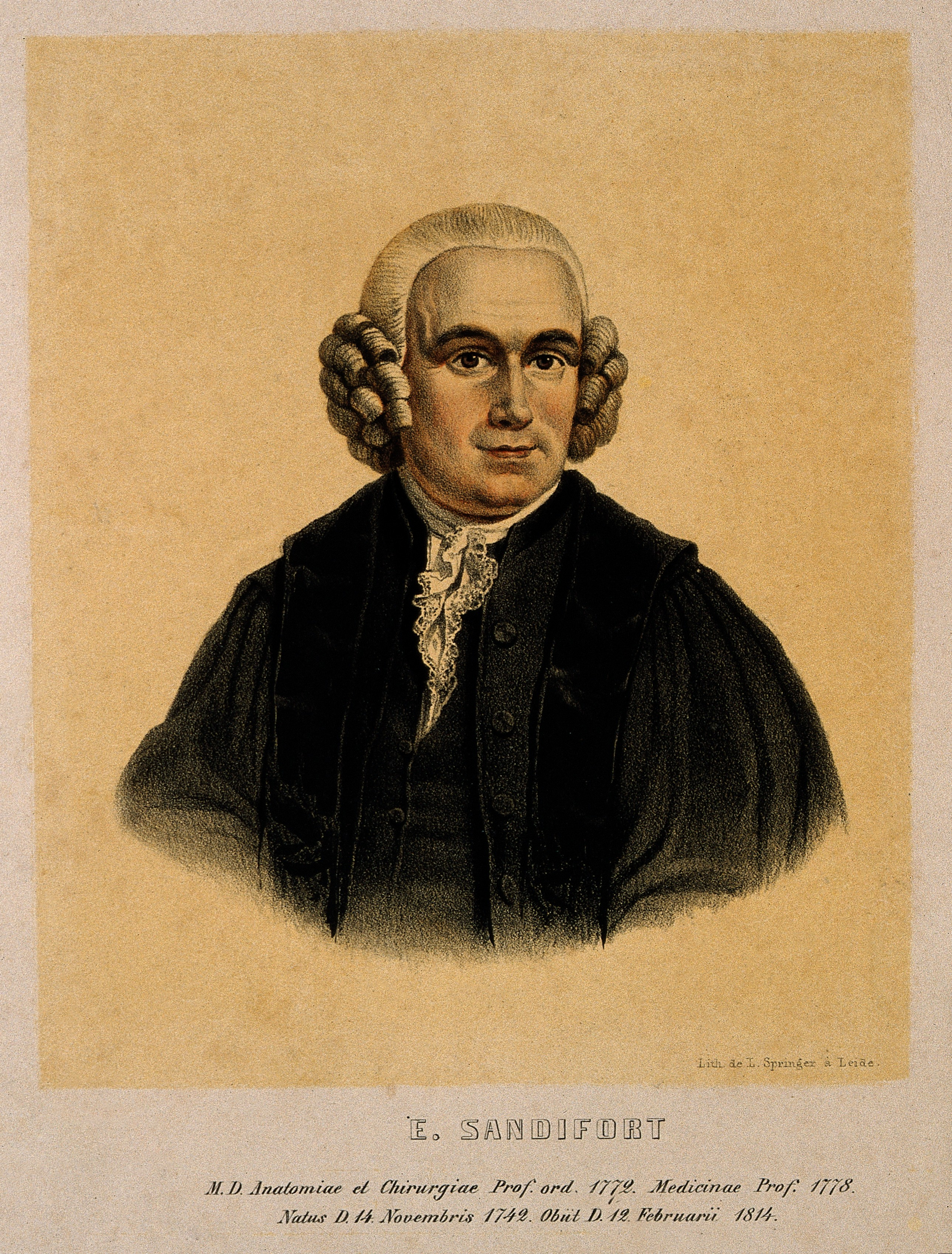 Genre/Technique: Portrait prints. Lithographs. Subject name: Sandifort, Eduard, 1742-1814.